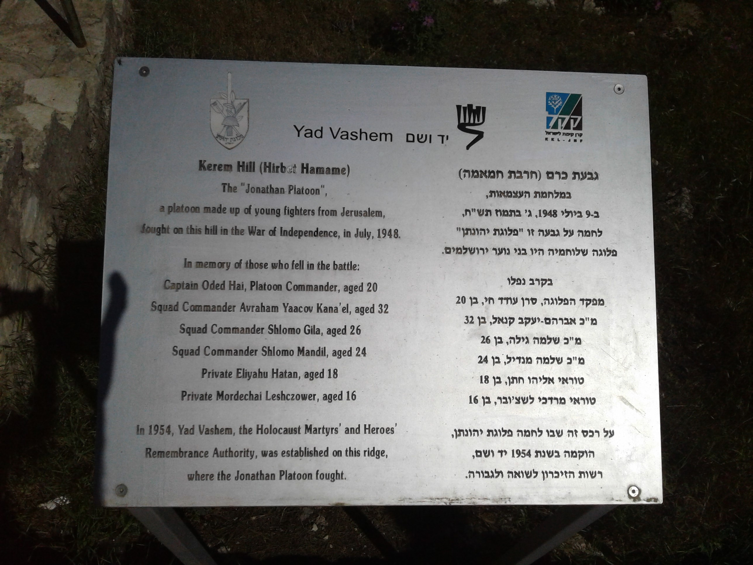 שלט הנצחה לפלוגת יהונתן ביער ירושלים, באתר הקרב על חרבת חמאמה (גבעת כרם)